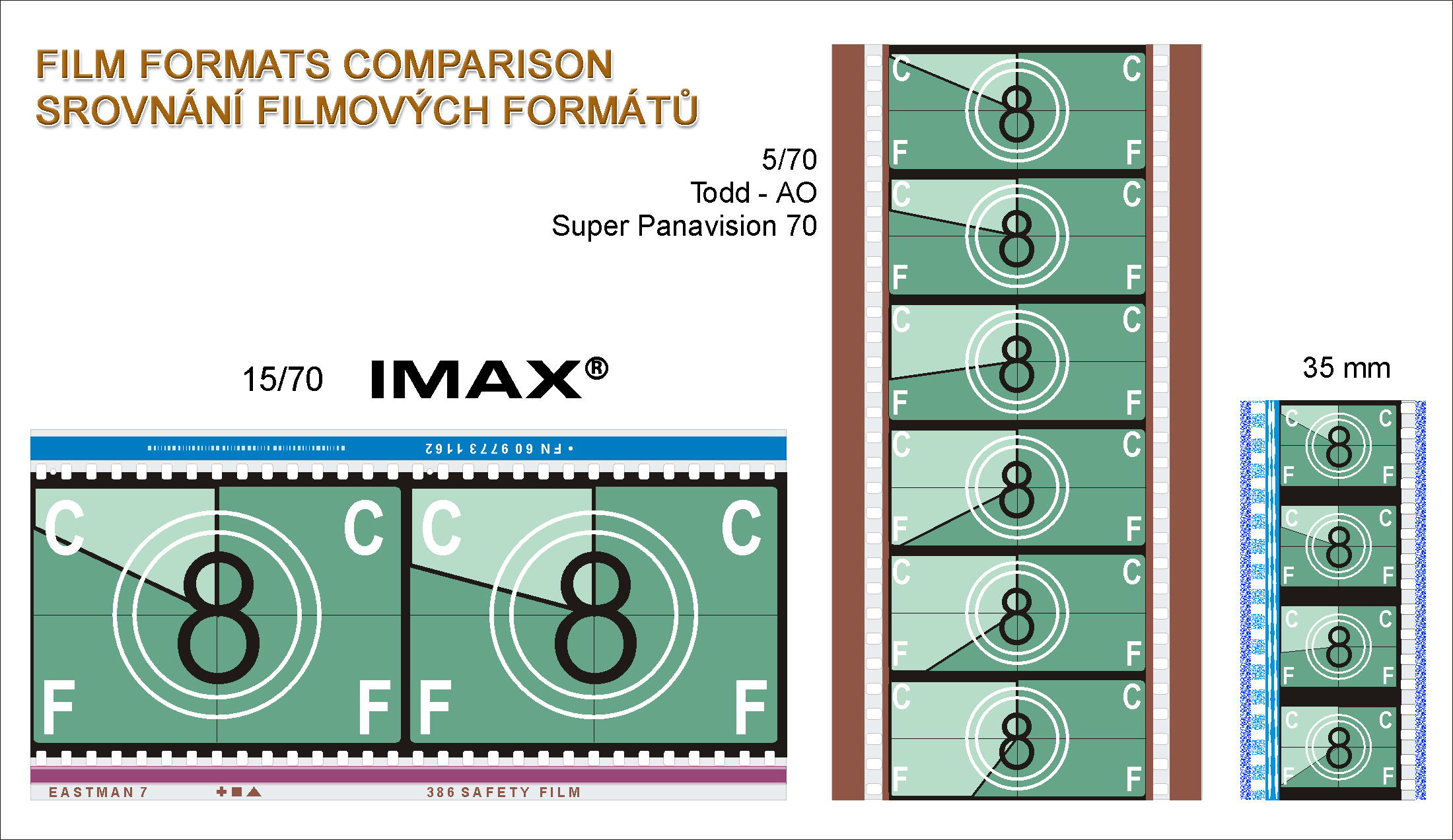 Srovnání formátů filmových kopií na 70mm a 35mm filmových pásech